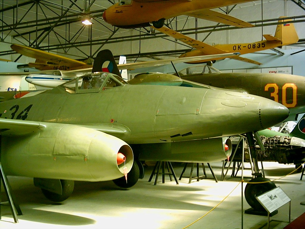 Avia S-92 (Czechoslovak-made Messerschmitt Me 262A), Kbely museum, Prague, Czech Republic